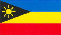 Прапор Молодогвардійська